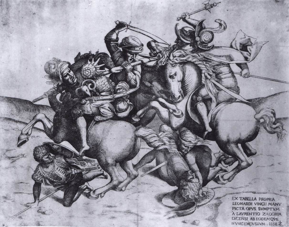 Lorenzo Zacchia, La Lutte pour l'étendard, gravure, 37,4 x 4,7 cm, 1558. Inscription : "Ex tabella propria Leonardi Vincii manu picta opus sumptum a Laurentio Zacchia Lucensi ab eodemque nunc excussum. 1558. LZ". Copie probable de la Tavola Doria.